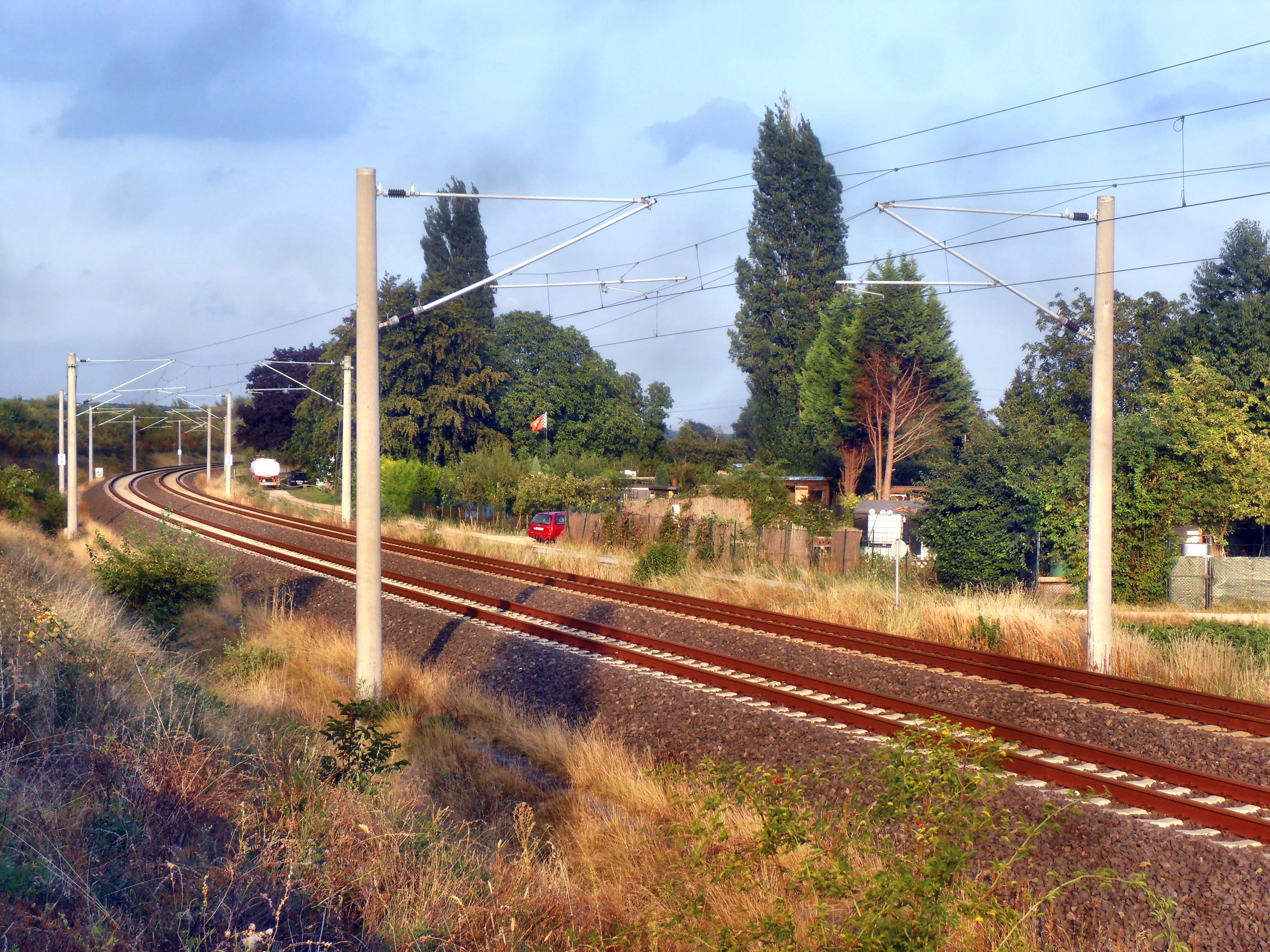 Verbindung des Wiesbadener Hauptbahnhofes zur Schnellfahrstrecke Köln–Rhein/Main, bei Streckenkilometer 7,0